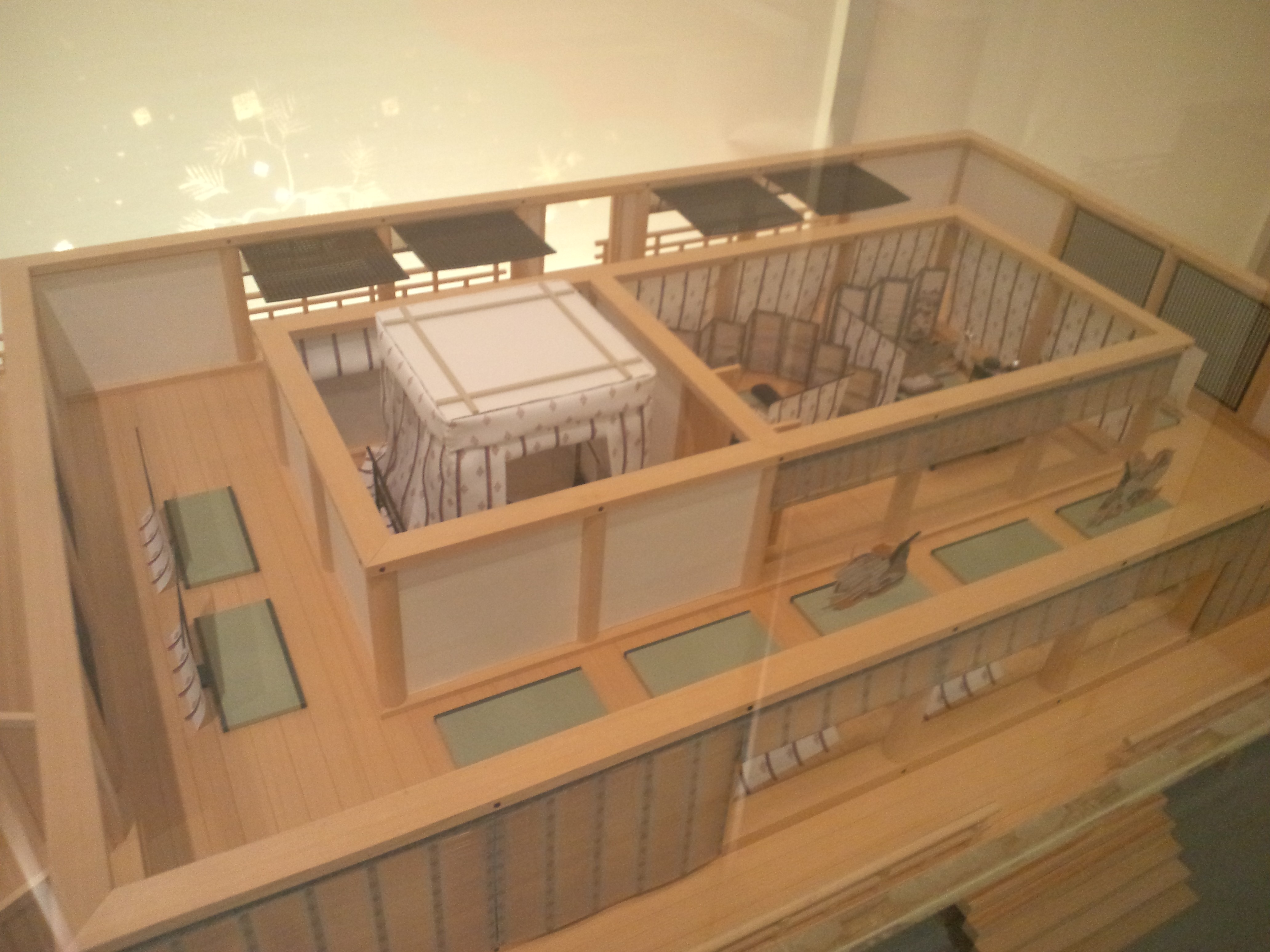 斎宮歴史博物館 展示物 斎王御殿 復元模型 1/15